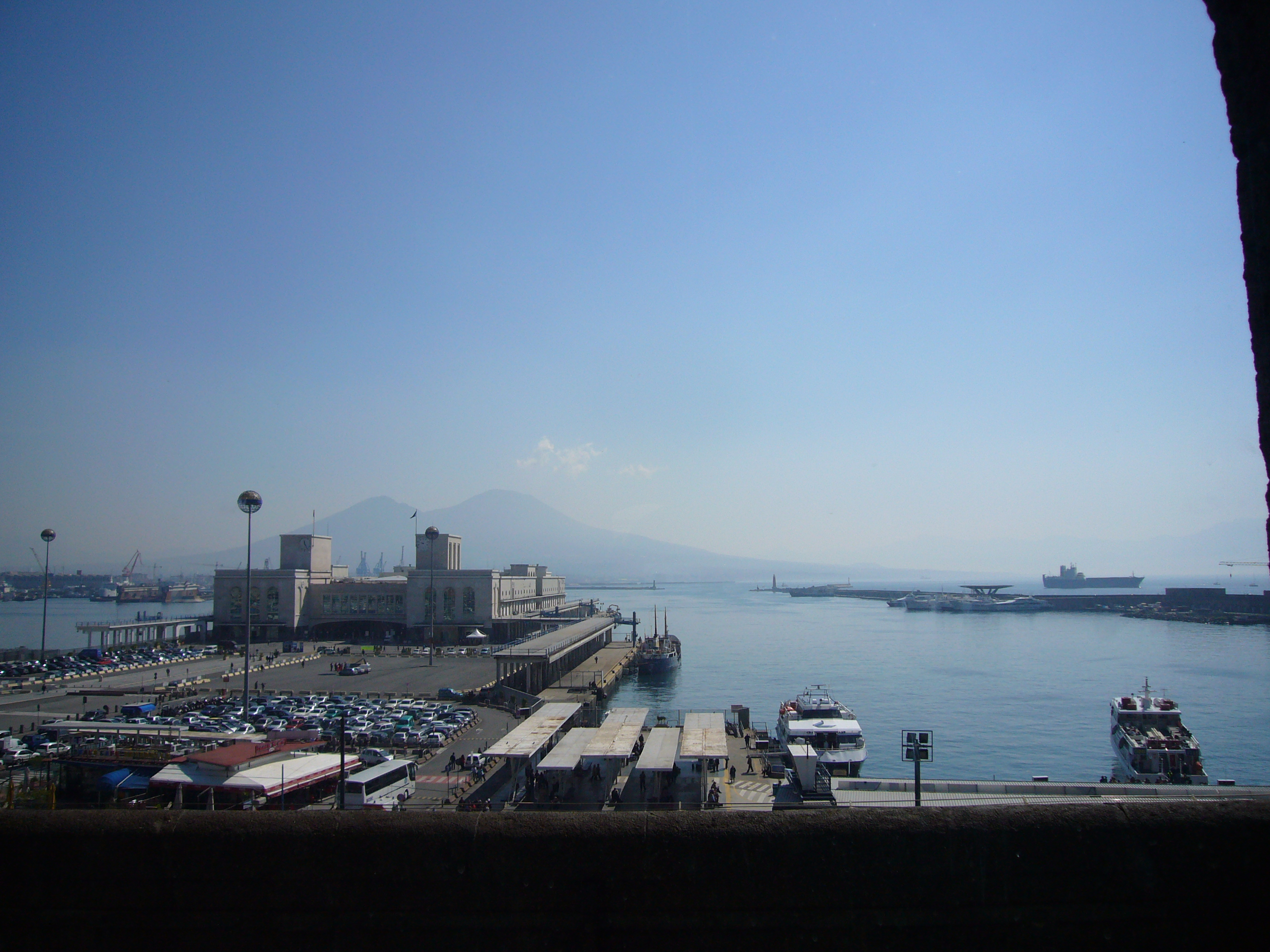 Napoli, Stazione marittima e porto da Castel Nuovo